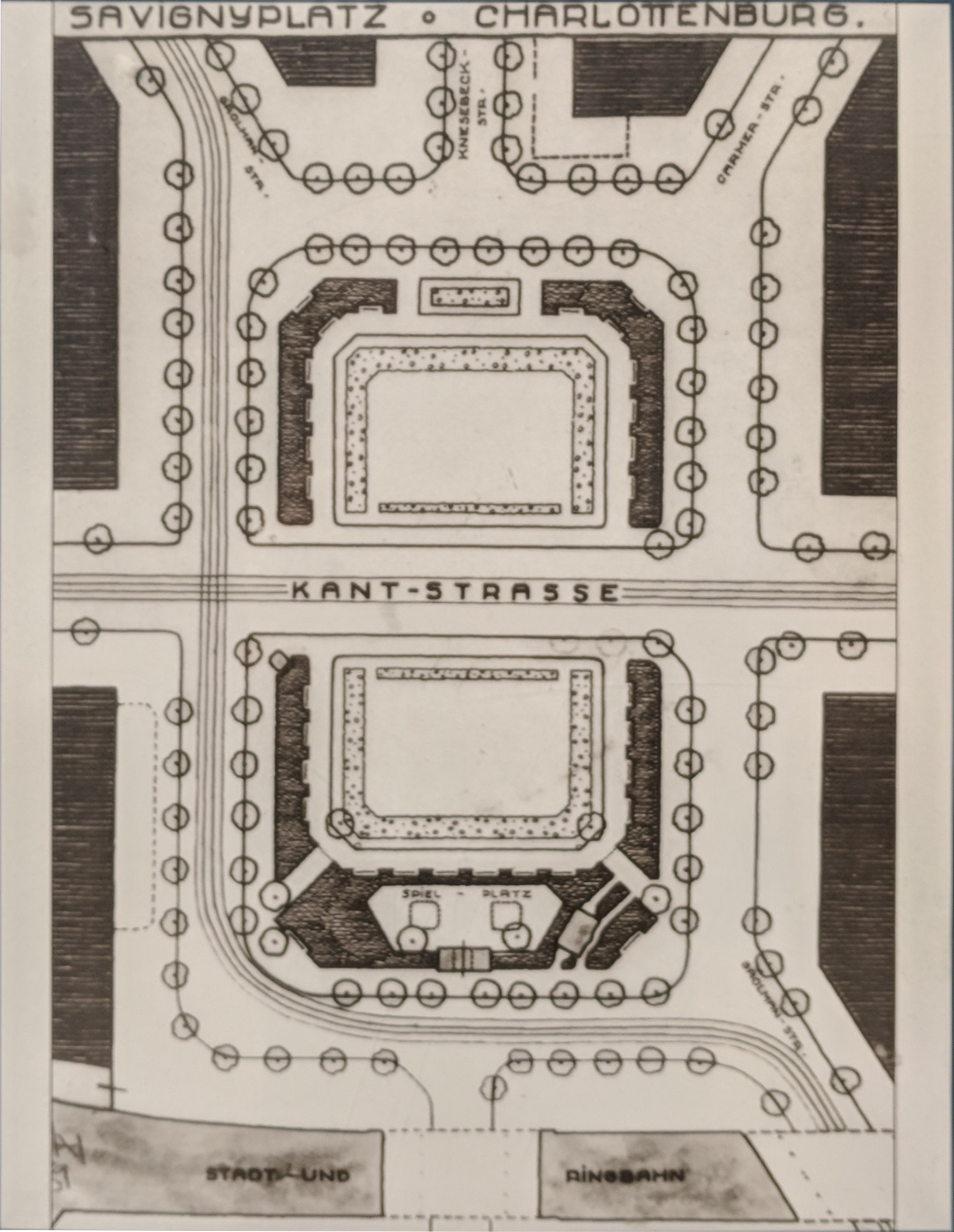 Entwursplan von Erwin Barth 1926